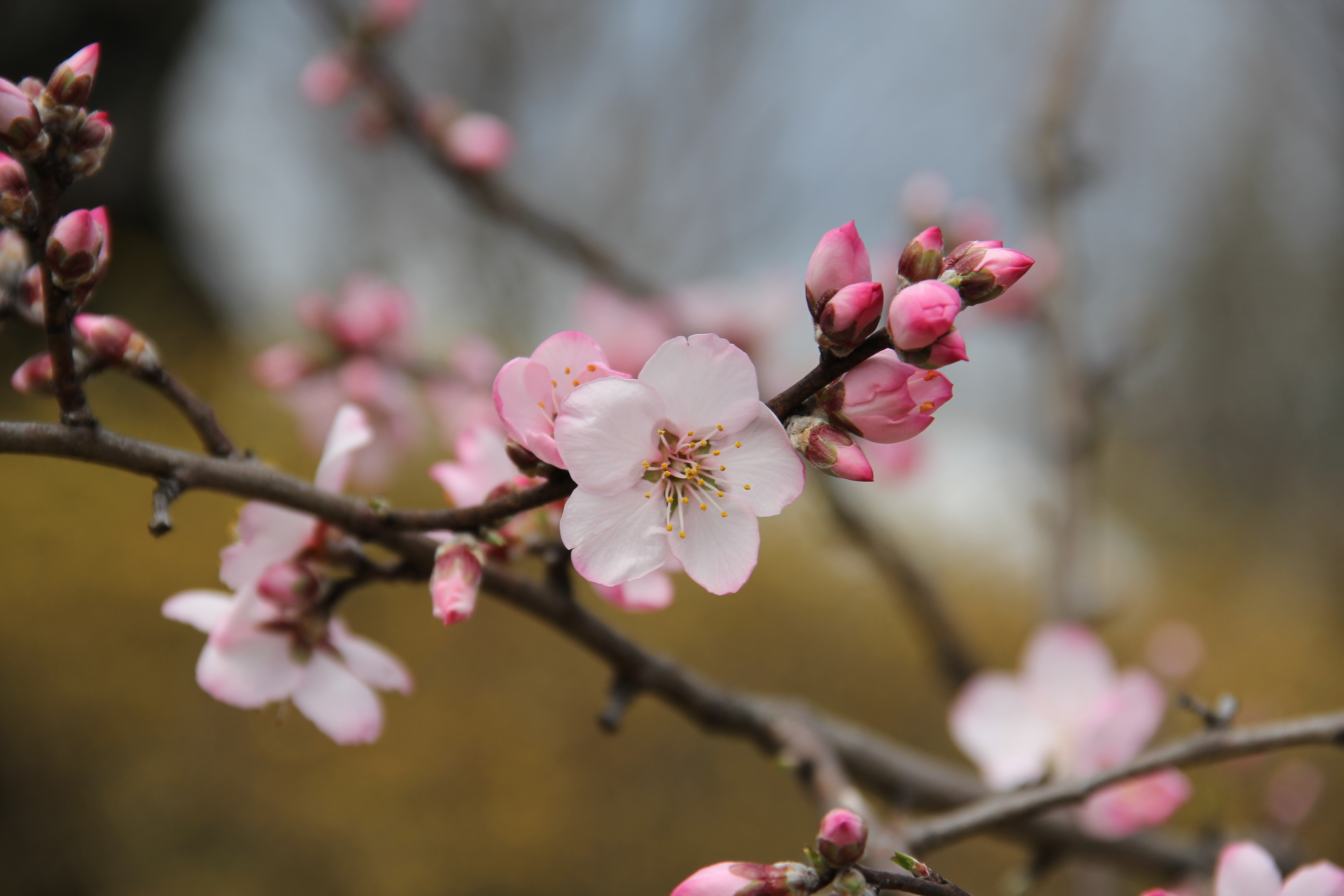 شکوفه بادام